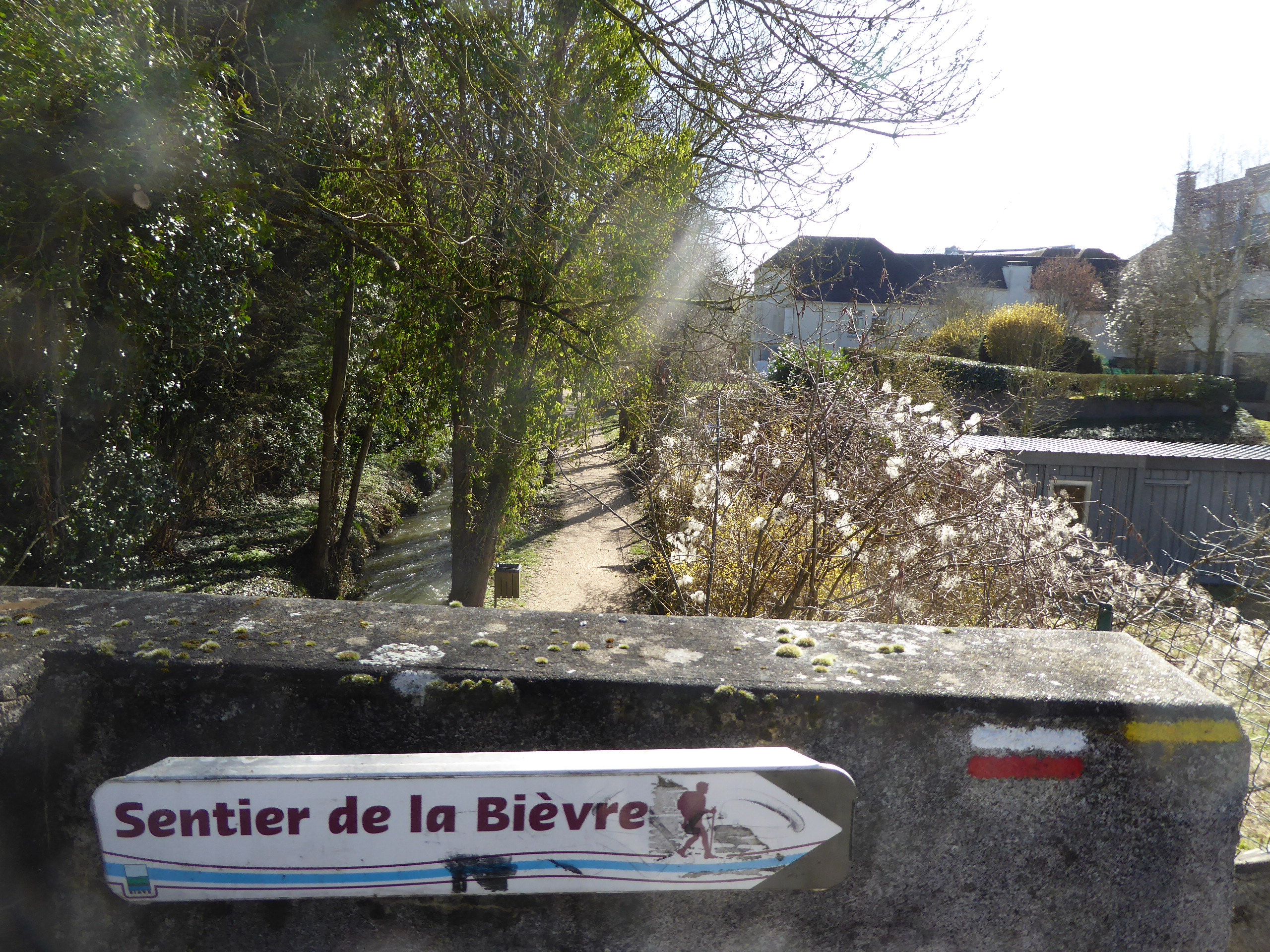 Panneau sentier